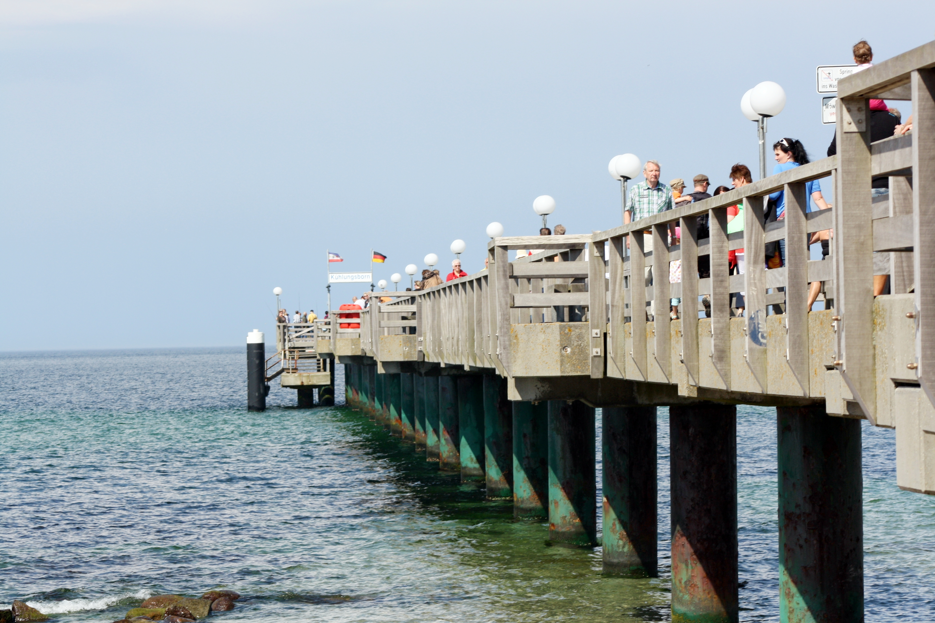 Kühlungsborn Seebrücke Seitenansicht